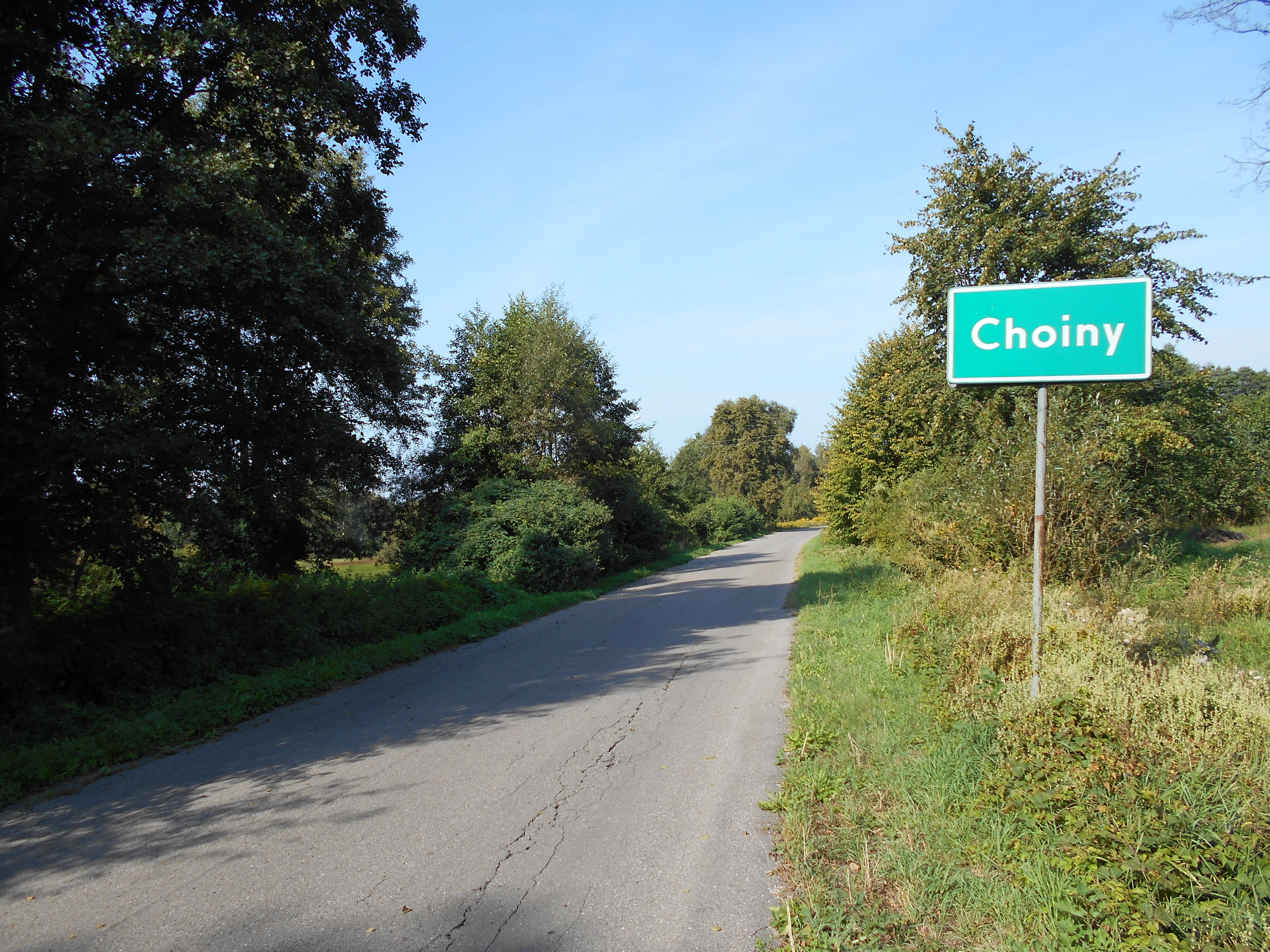 Miejscowość w gminie Stanisławów.